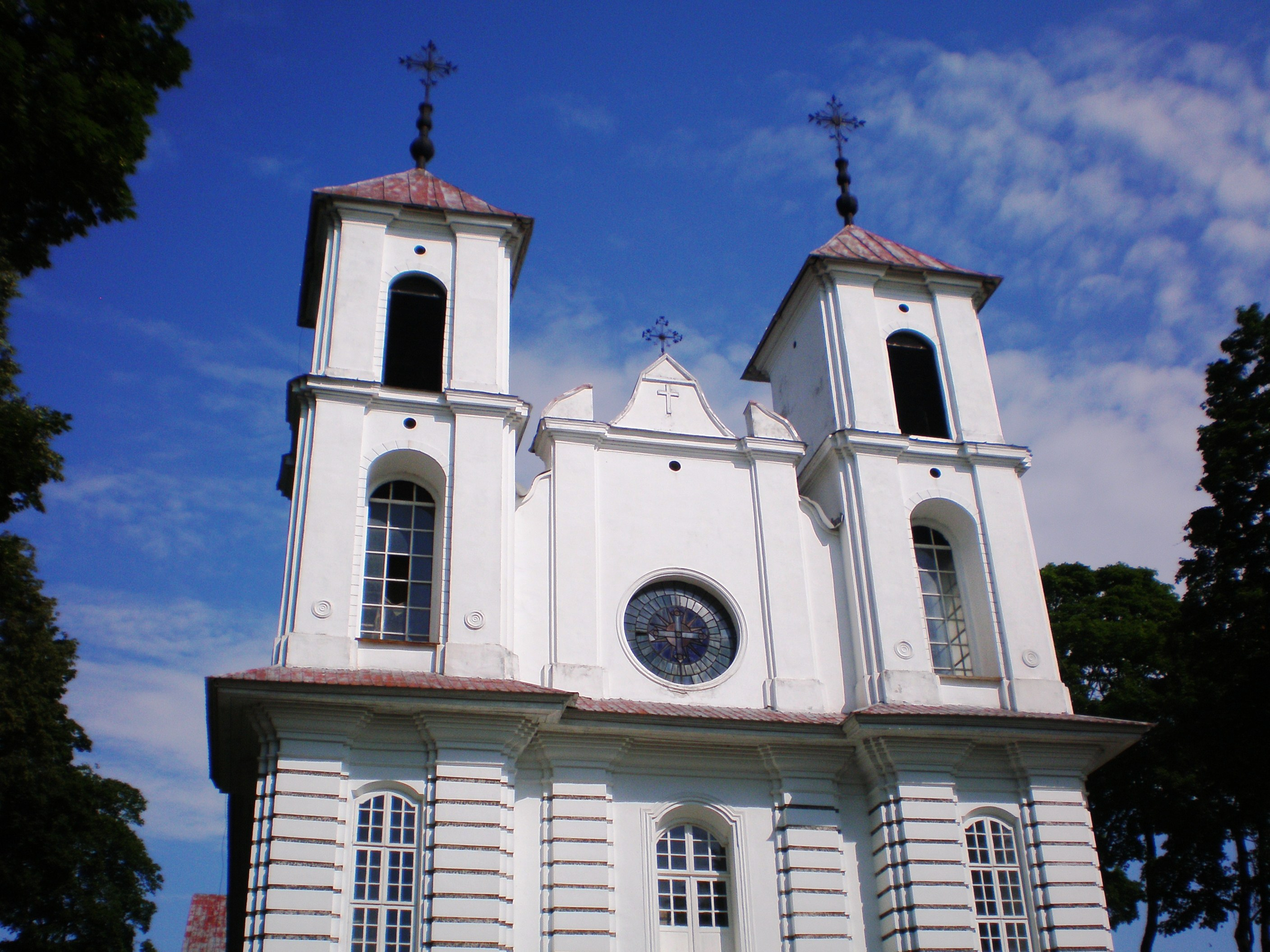 Punios bažnyčia, Alytaus raj.